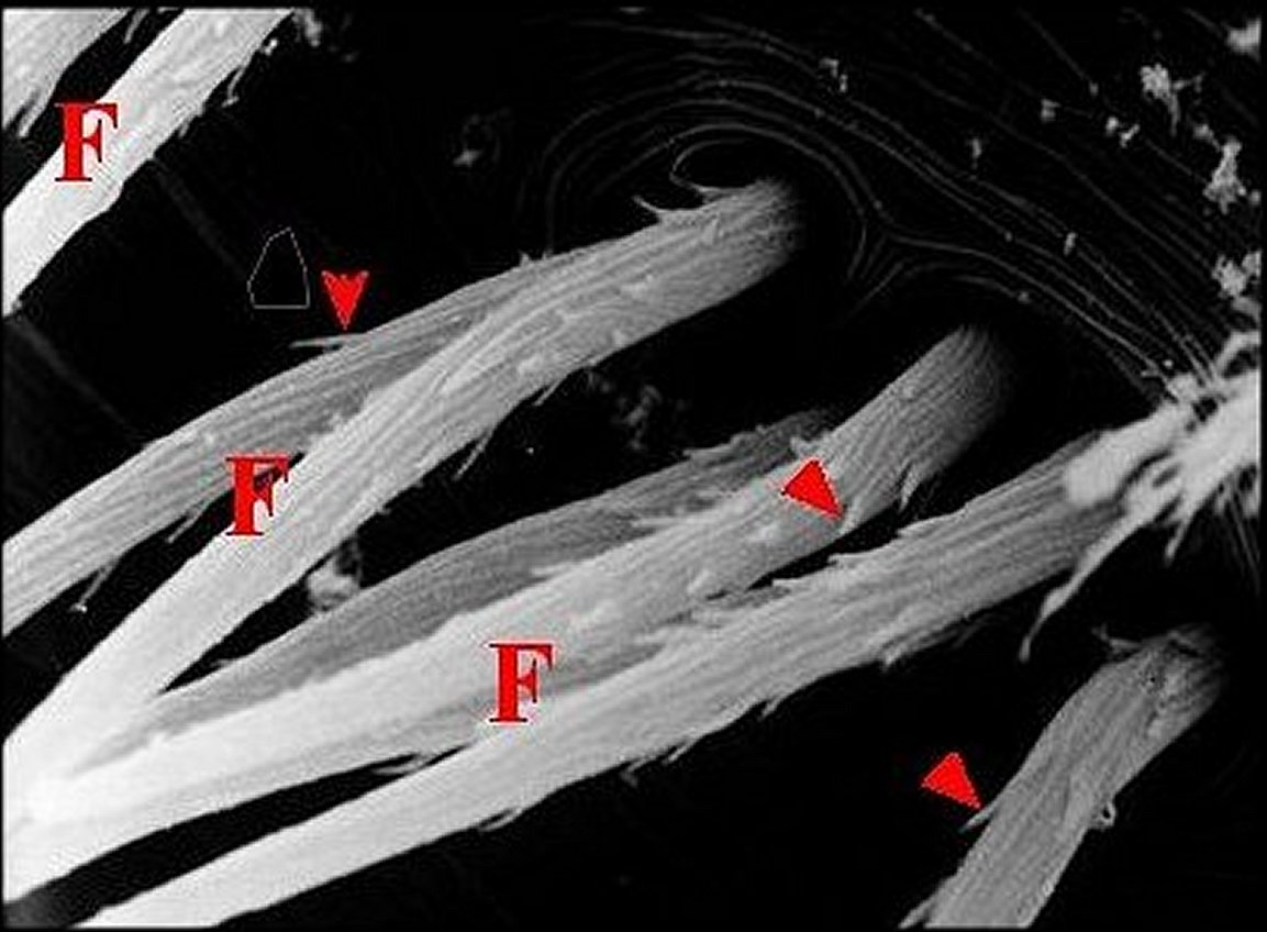 Fusules épigastriques d' Amaurobius erberi mâle au microscope électronique à balayage